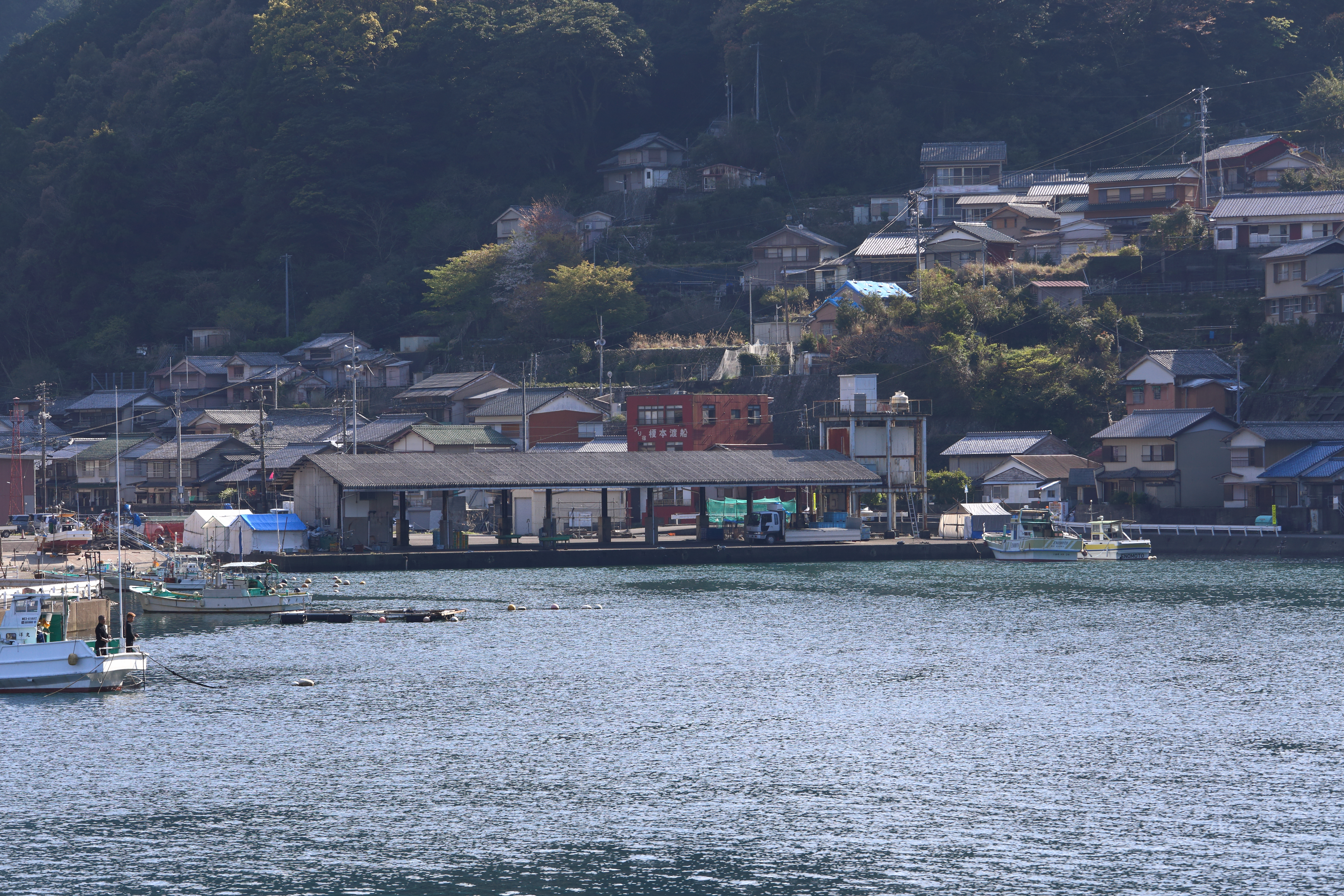 梶賀漁港 水揚げ場（中央） 三重県尾鷲市梶賀町